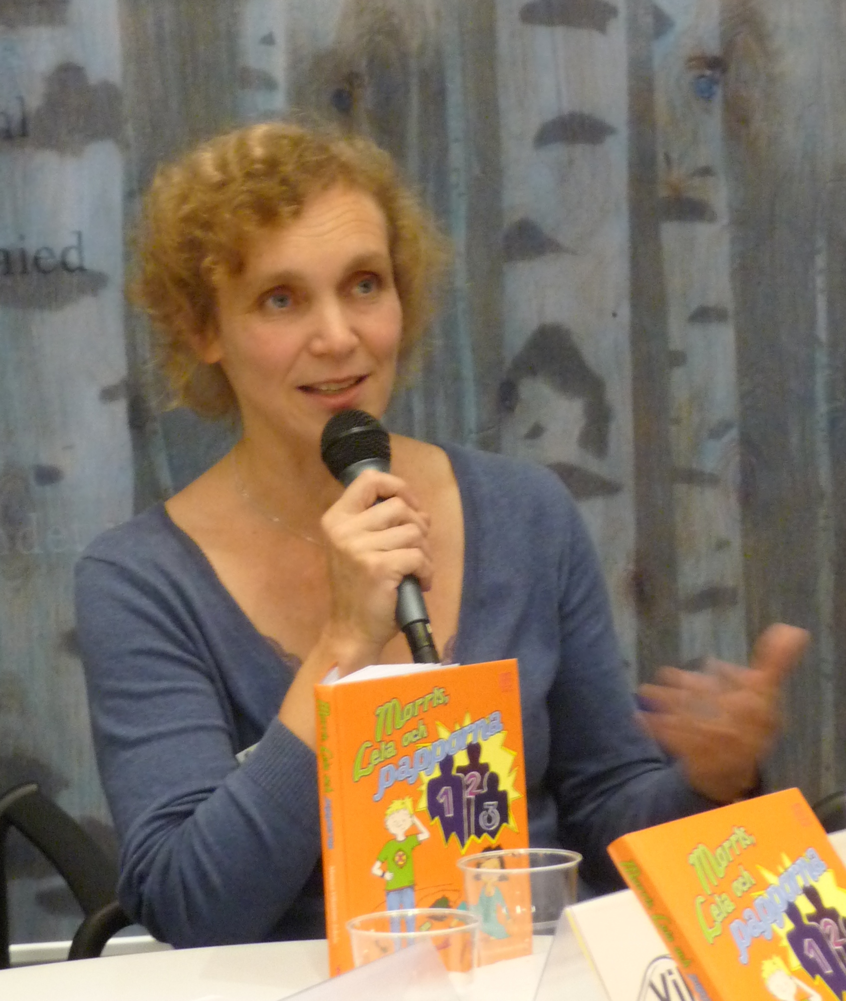 Monika Vikström-Jokela på bokmässan i Göteborg 2009.